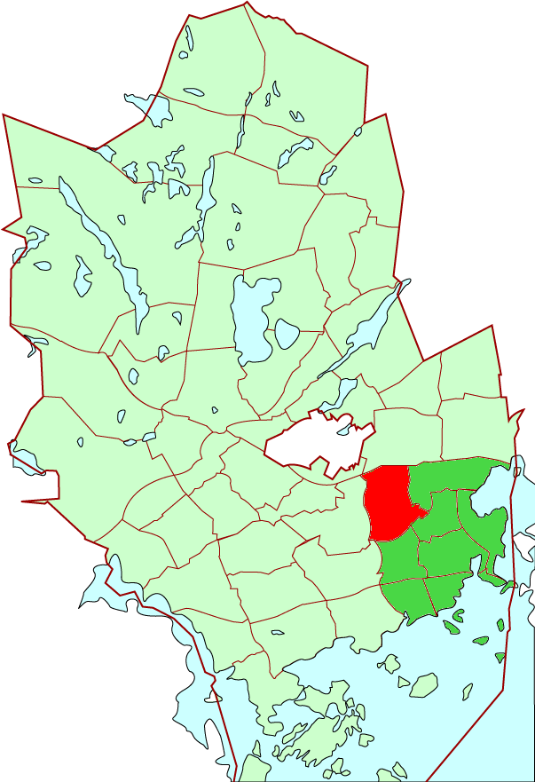 Mankkaa/Mankans district in Espoo city, Finland